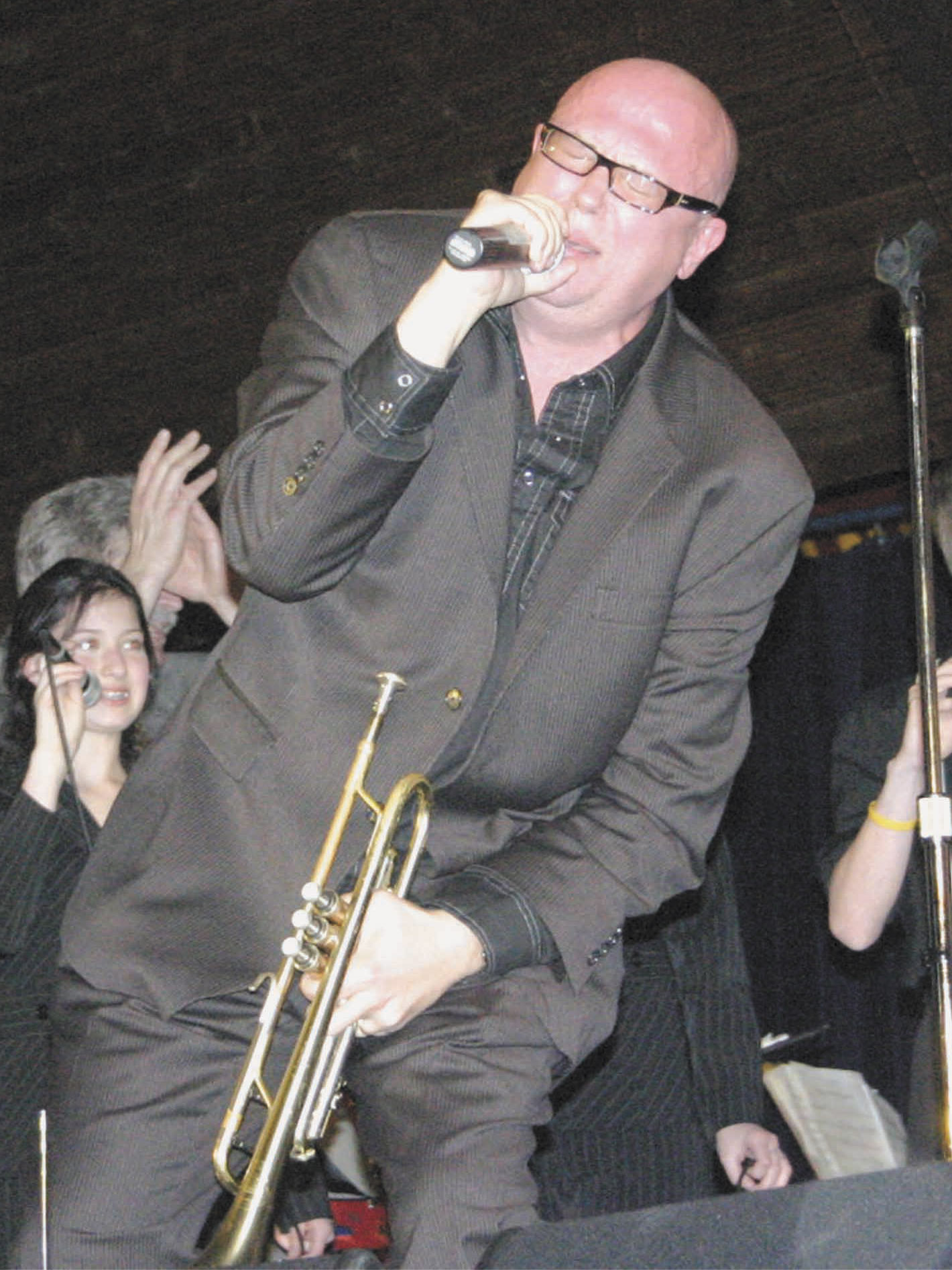 Mark Pender